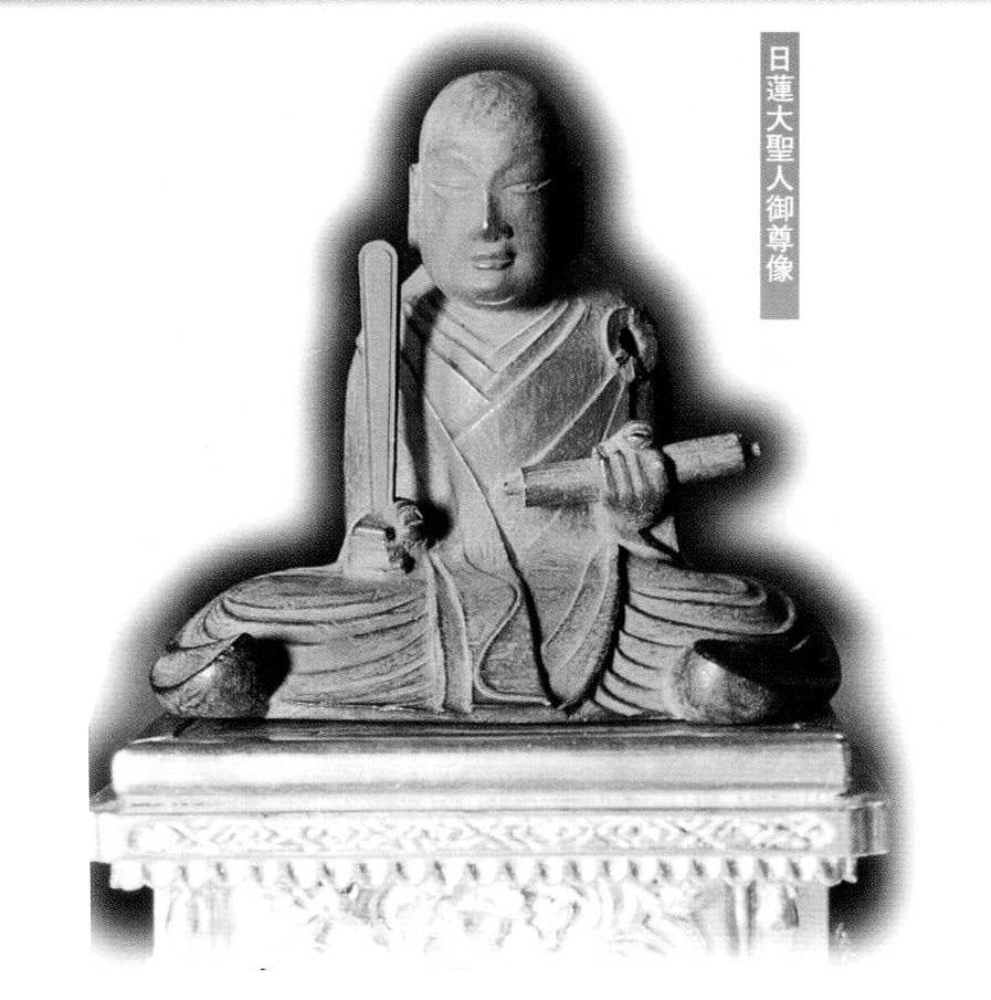 岡宮光長寺御影 泉公日法作と伝わる